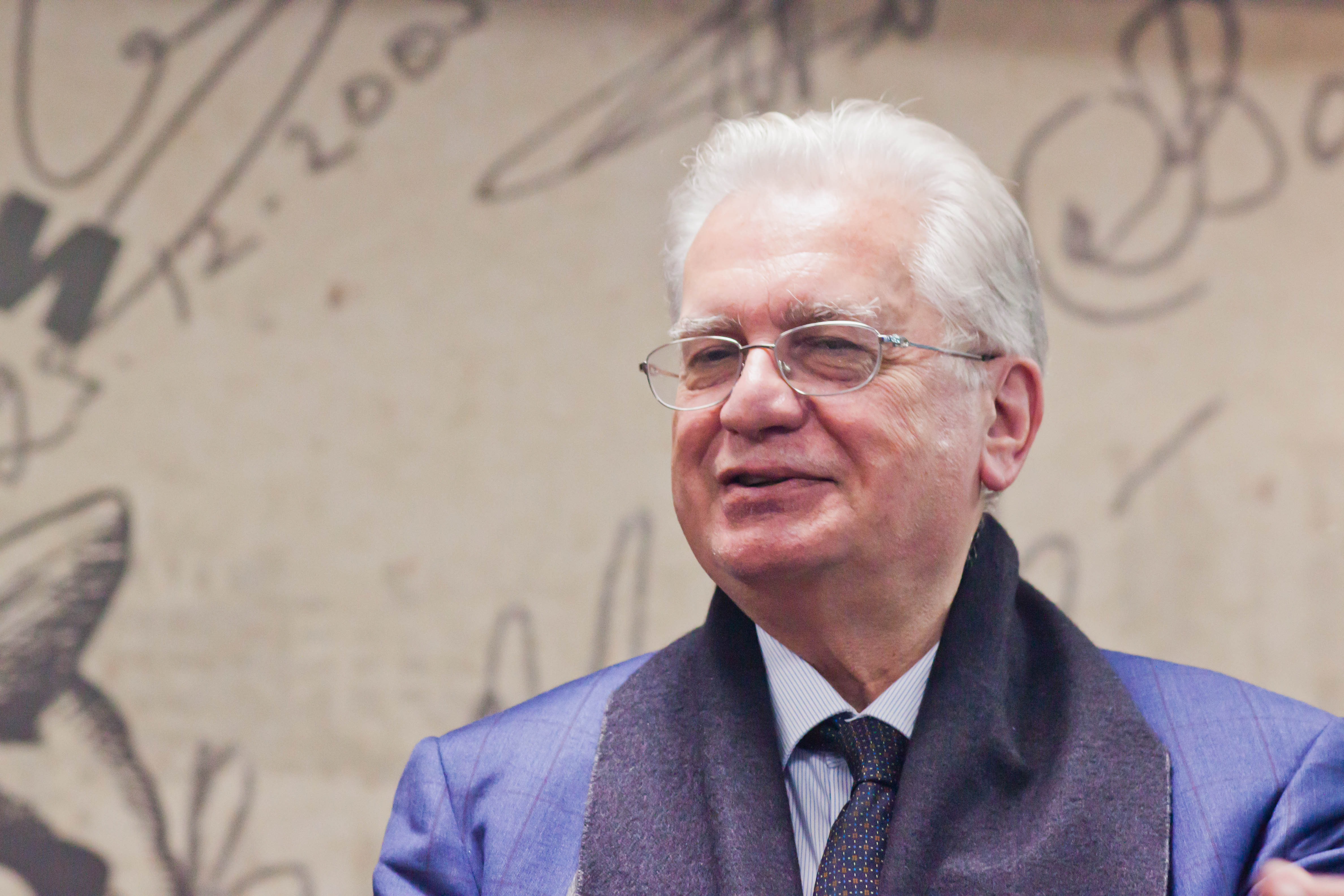 Михаио Пиотровский на презентации книги Джеральдин Норман "Пиотровские. Хранители ковчега" в Московском доме книги на Новом Арбате